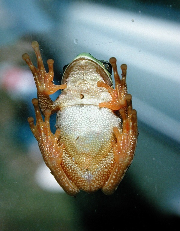 Europäischer Laubfrosch (Hyla arborea), Europäische Türkei